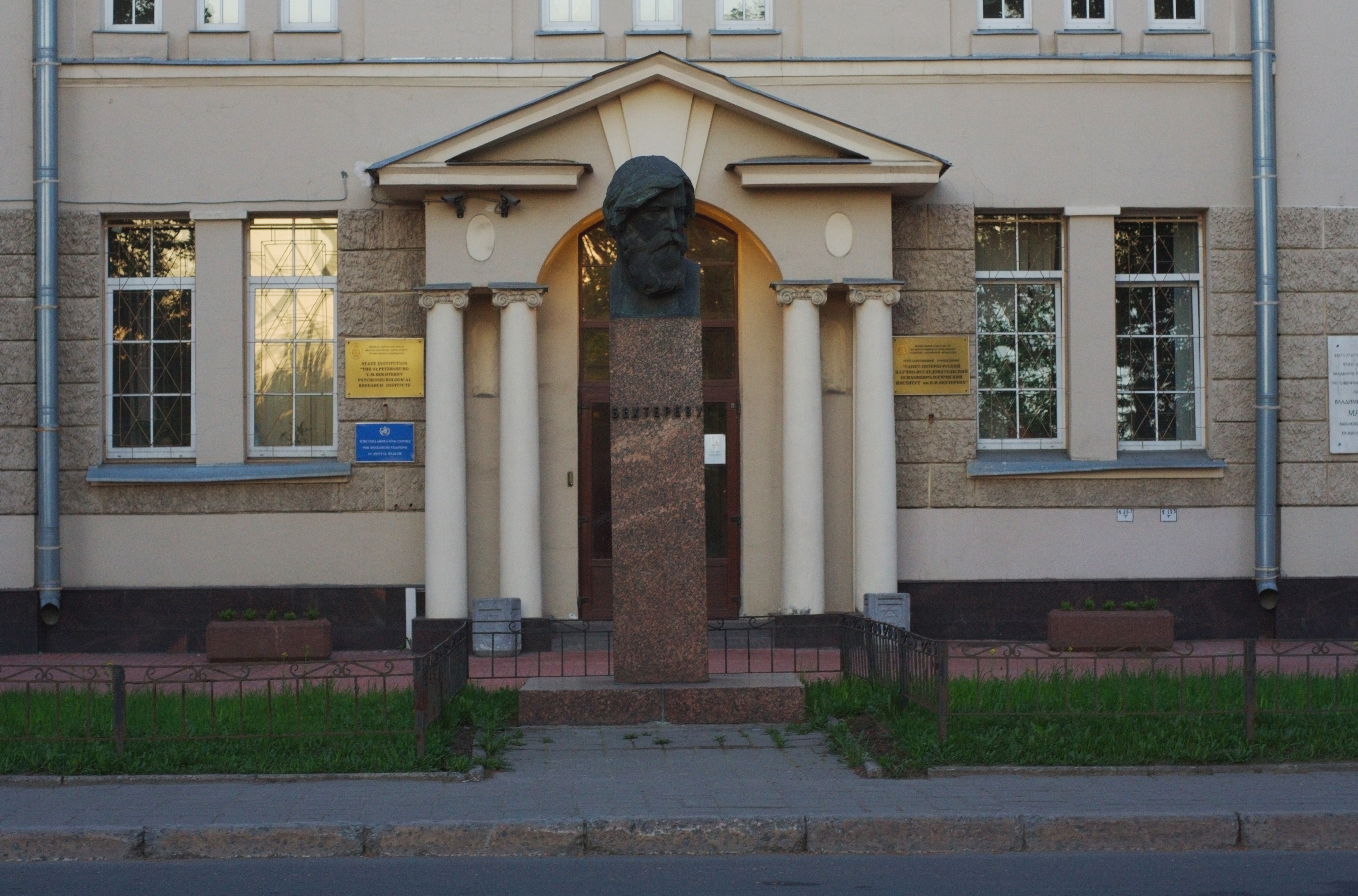 Бюст В.М. Бехтерева: улица Бехтерева, 3, Невский район, Санкт-Петербург